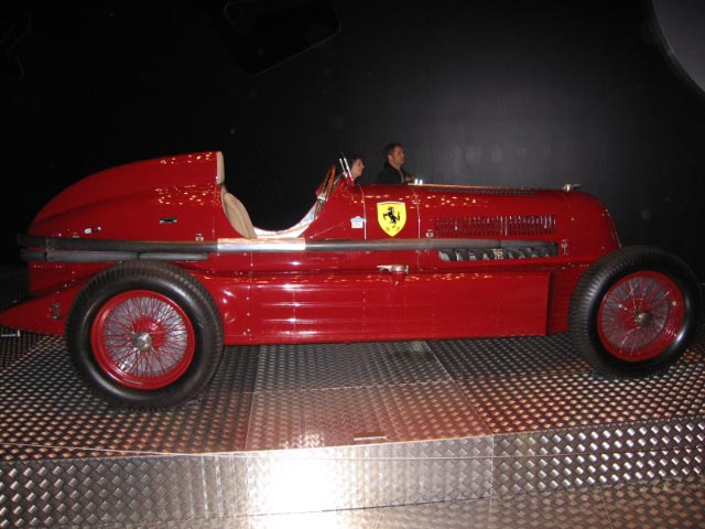 Scuderia Ferrari 1935 Alfa Romeo Bimotore.